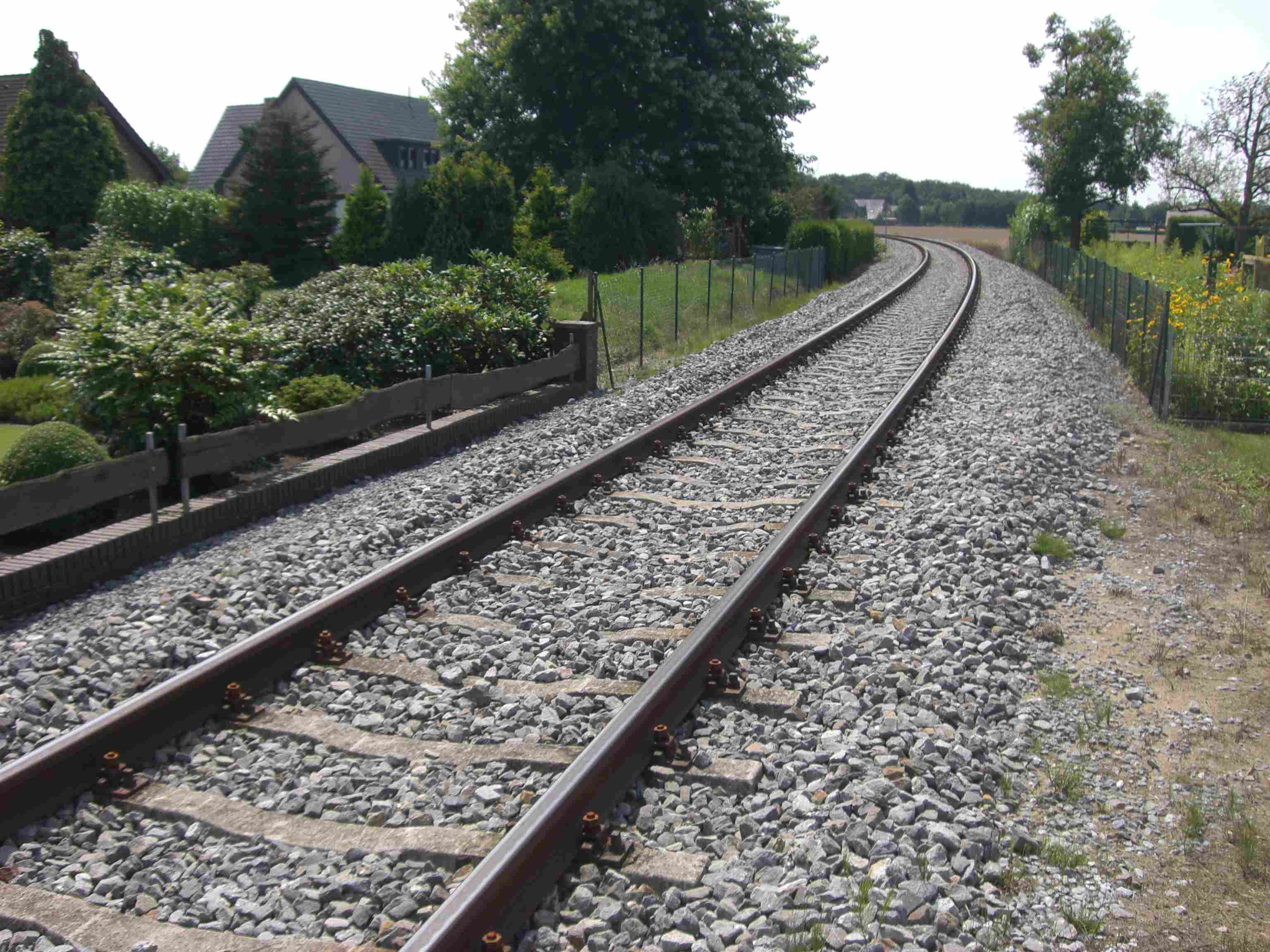 Tecklenburger Nordbahn in Recke-Obersteinbeck, Kreis Steinfurt, North Rhine-Westphalia, Germany.